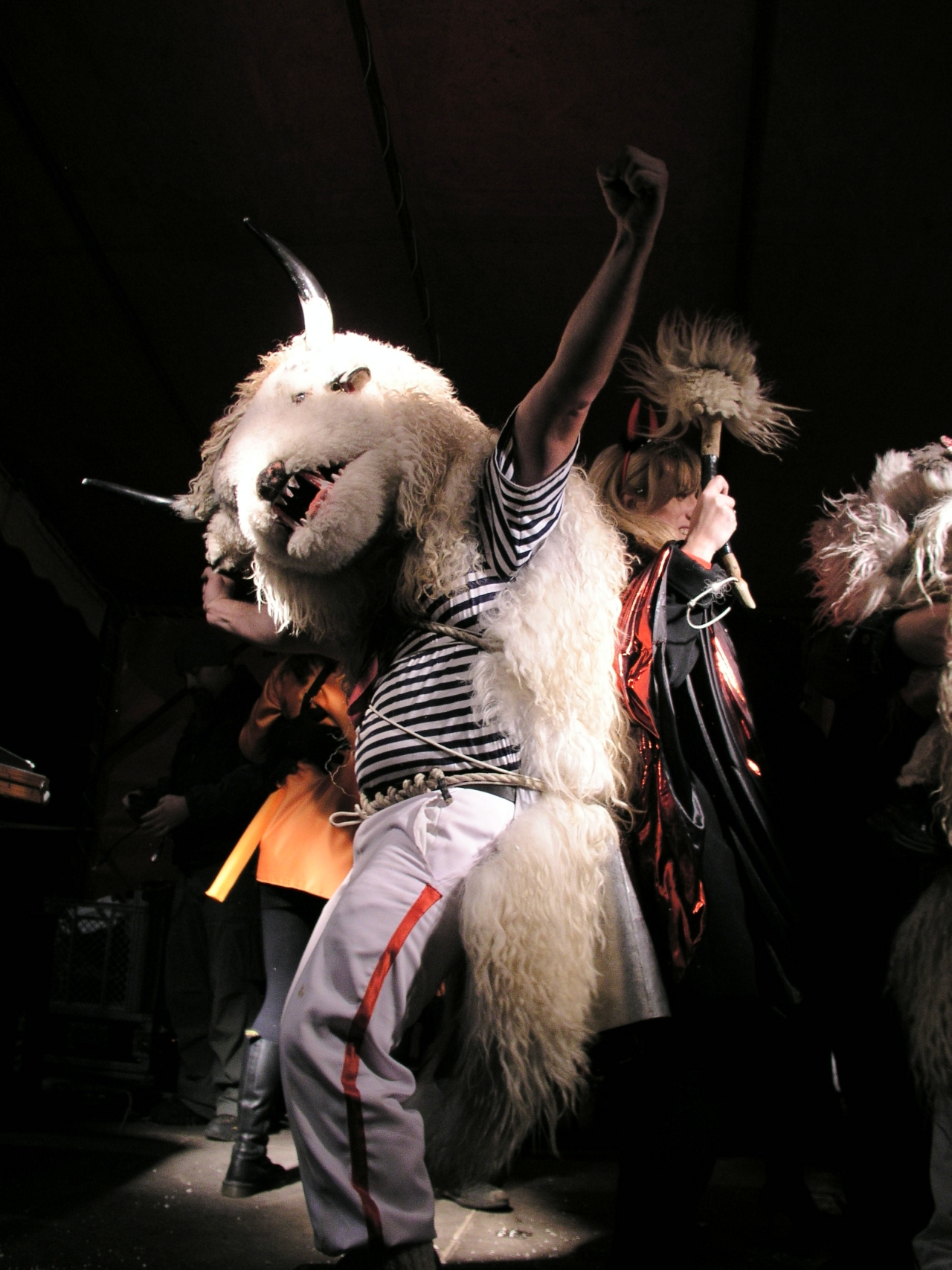 Halubajski zvončari, Viškovo, Hrvatska